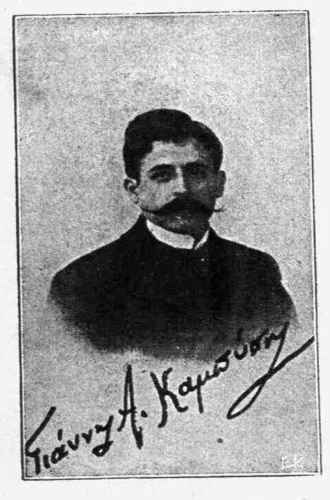 griechischer Schriftsteller, Athen, 19. Jahrhundert